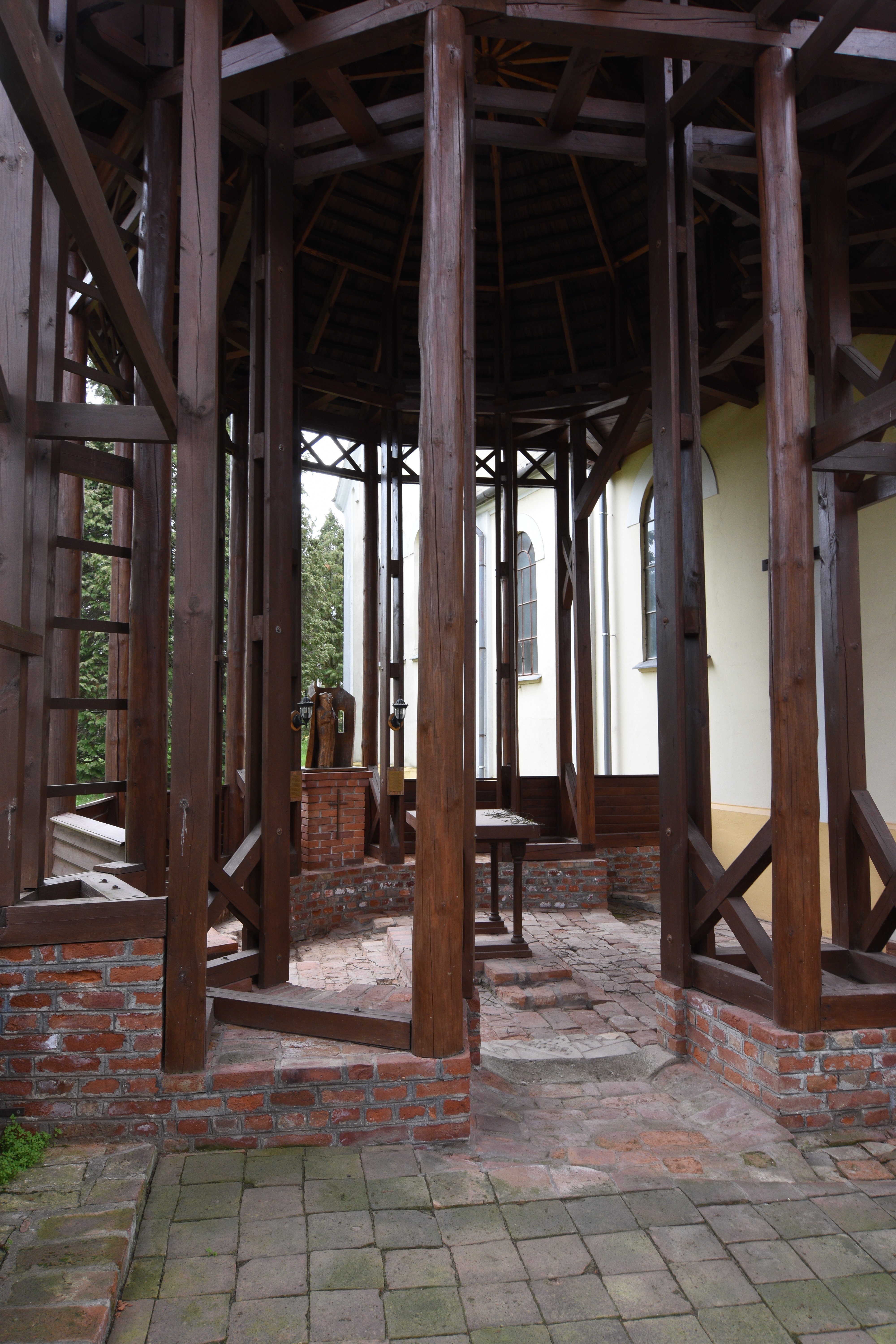 Roman Catholic Church in Nádasd